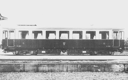 Elettromotrice tranviaria ad accumulatori B.021 della STV, costruita dalla Stanga.